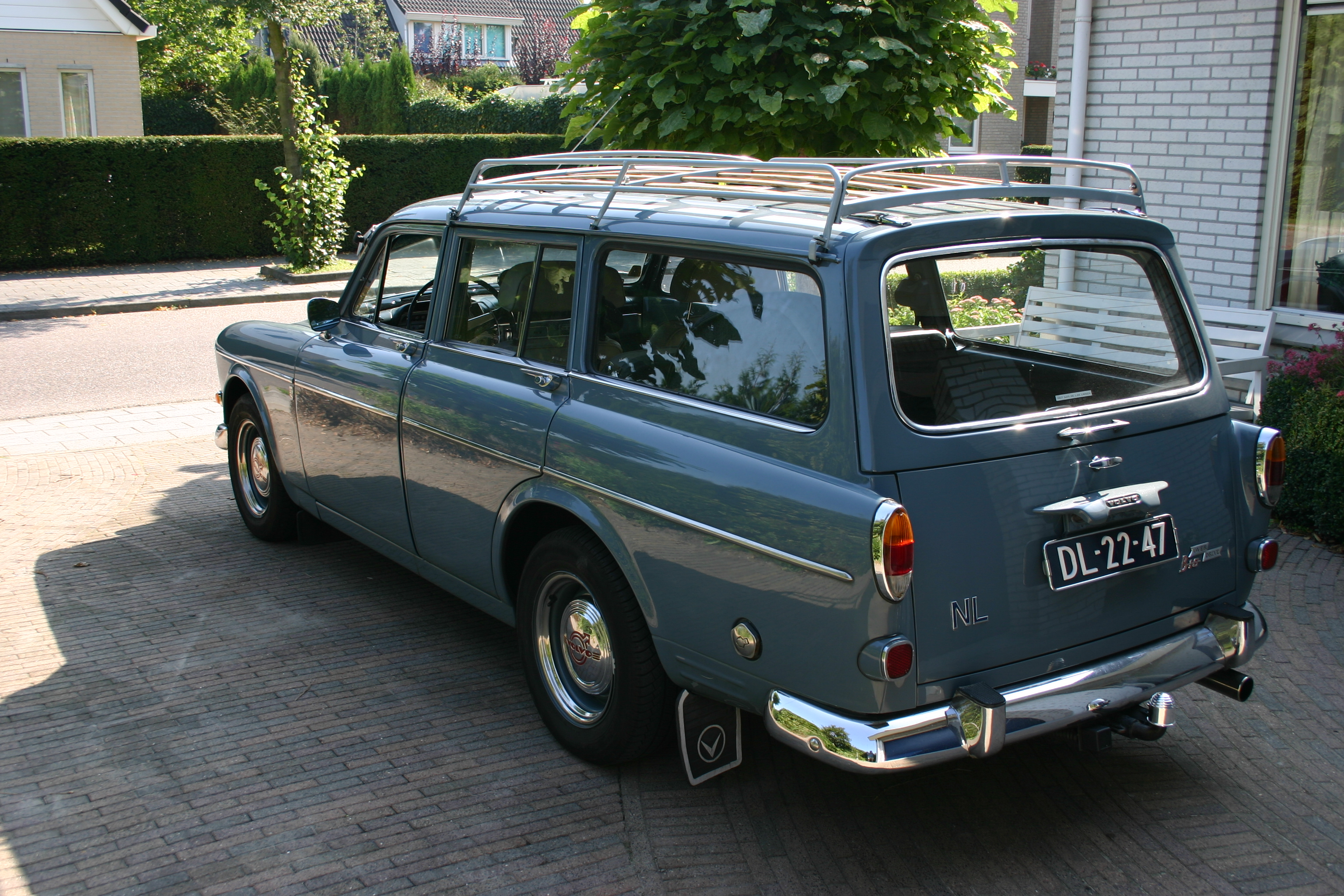 My Volvo '63